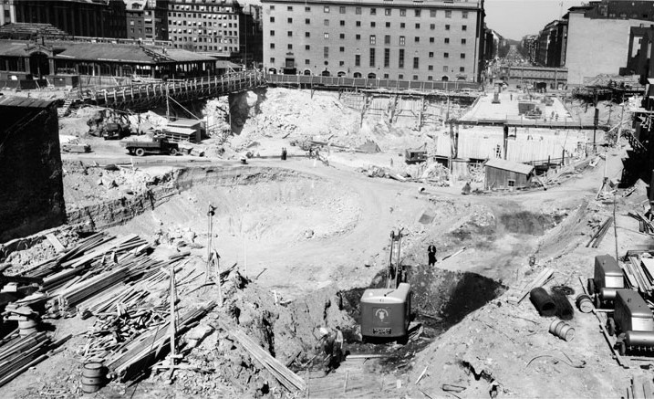 Riksgropen, bygget av tunnelbanan vid Hötorget och schaktarbetena för Hötorgsskraporna. Till vänster pågår rivning av den gamla Hötorgshallen. I bakgrunden syns Konserthuset. Till höger vid Sveavägen syns tunneln för tunnelbanan.